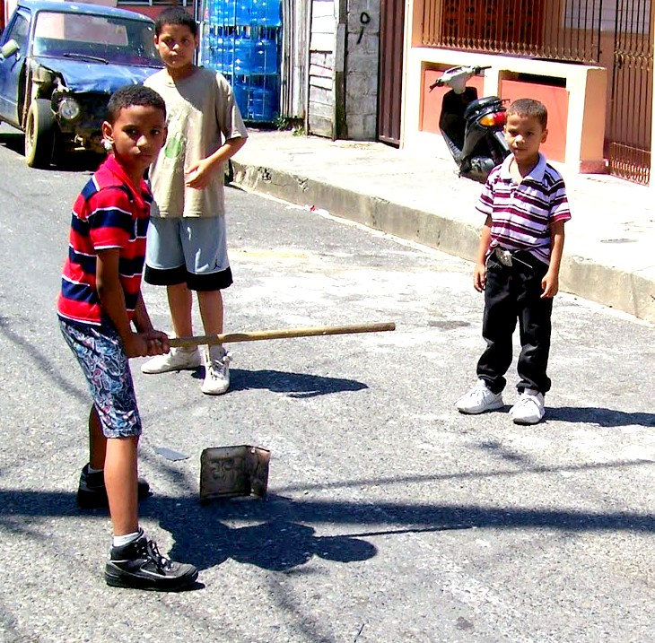 La Plaquita, una variación del Cricket.